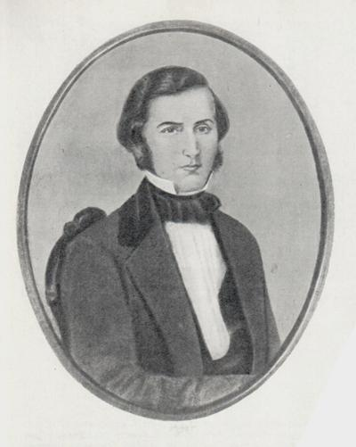 Костянтин Дмитрович Ушинський - студент Московського університету.